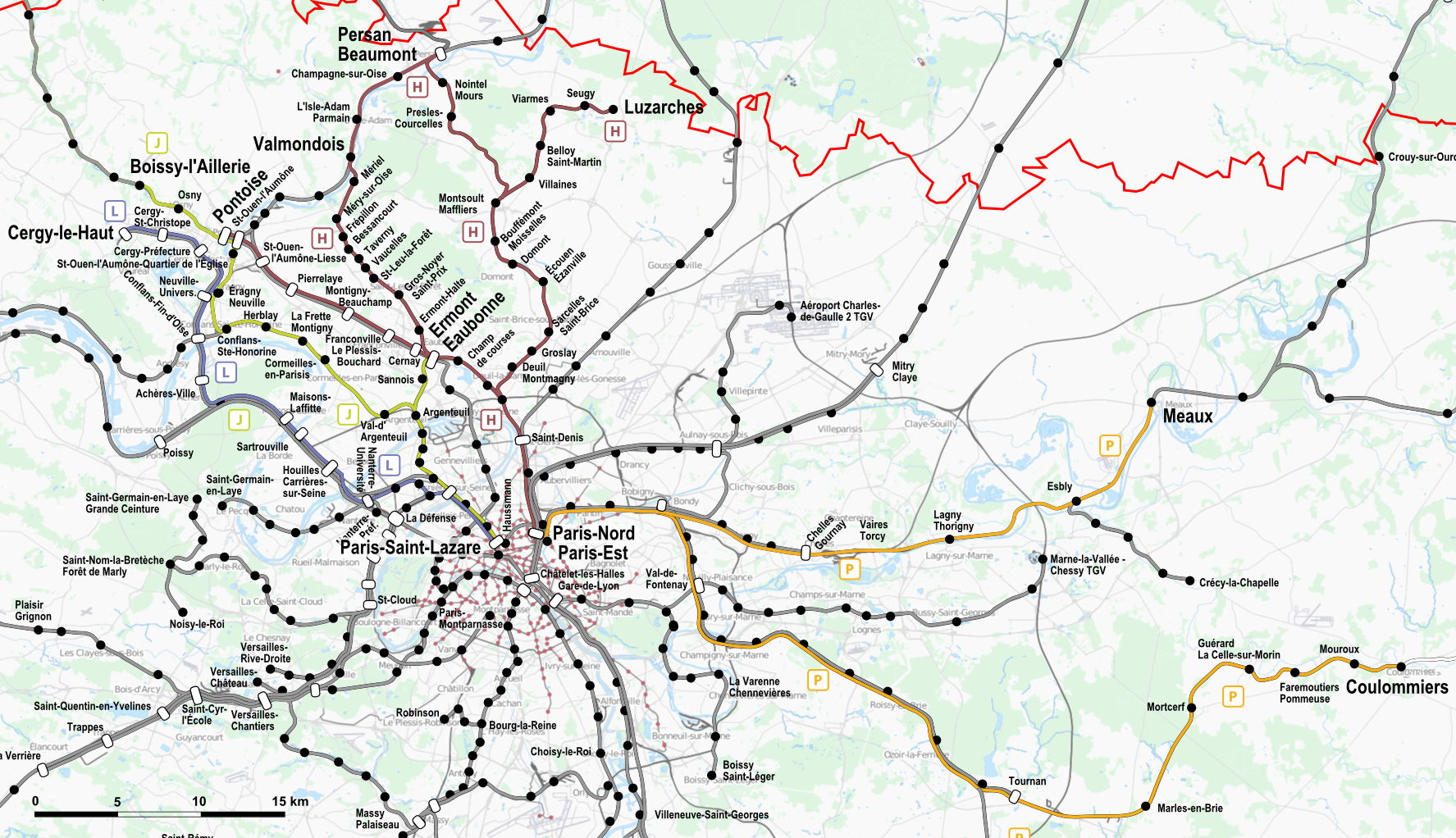 Carte du déploiement des Z 50000 après la livraison de l'ensemble de l'effectif de la première commande ferme.